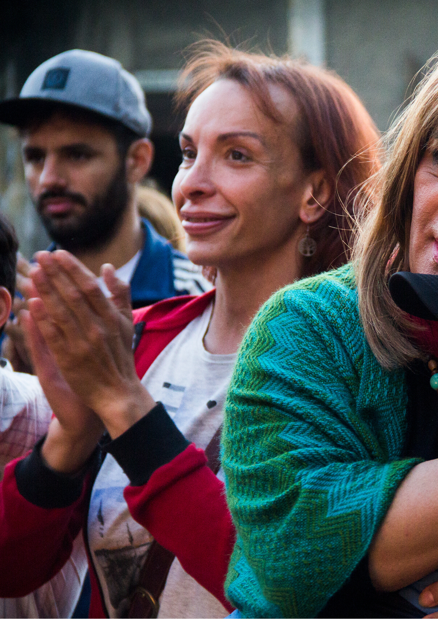 La psicóloga y activista trans Marcela Pini en la Semana de Arte Trans de Montevideo en 2018.